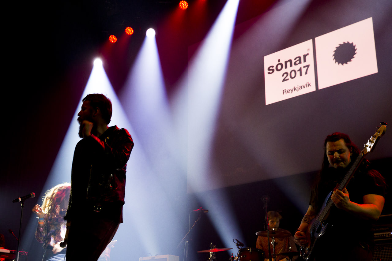 Berndsen en Festival Sonar Reykjavik 2017